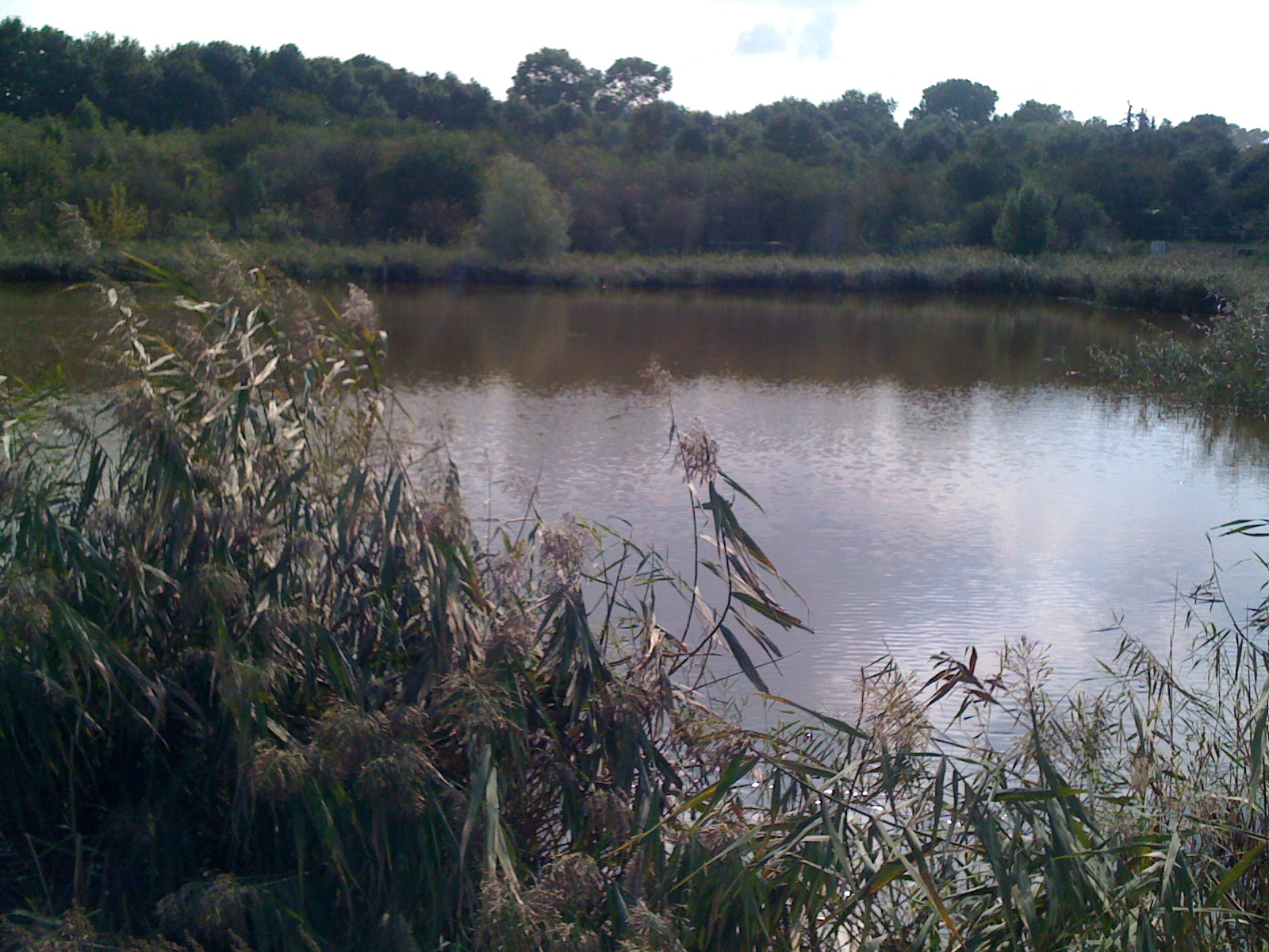 Westlicher Nebensee (Ottoteich) des Heidesees in Halle (Saale) von Osten